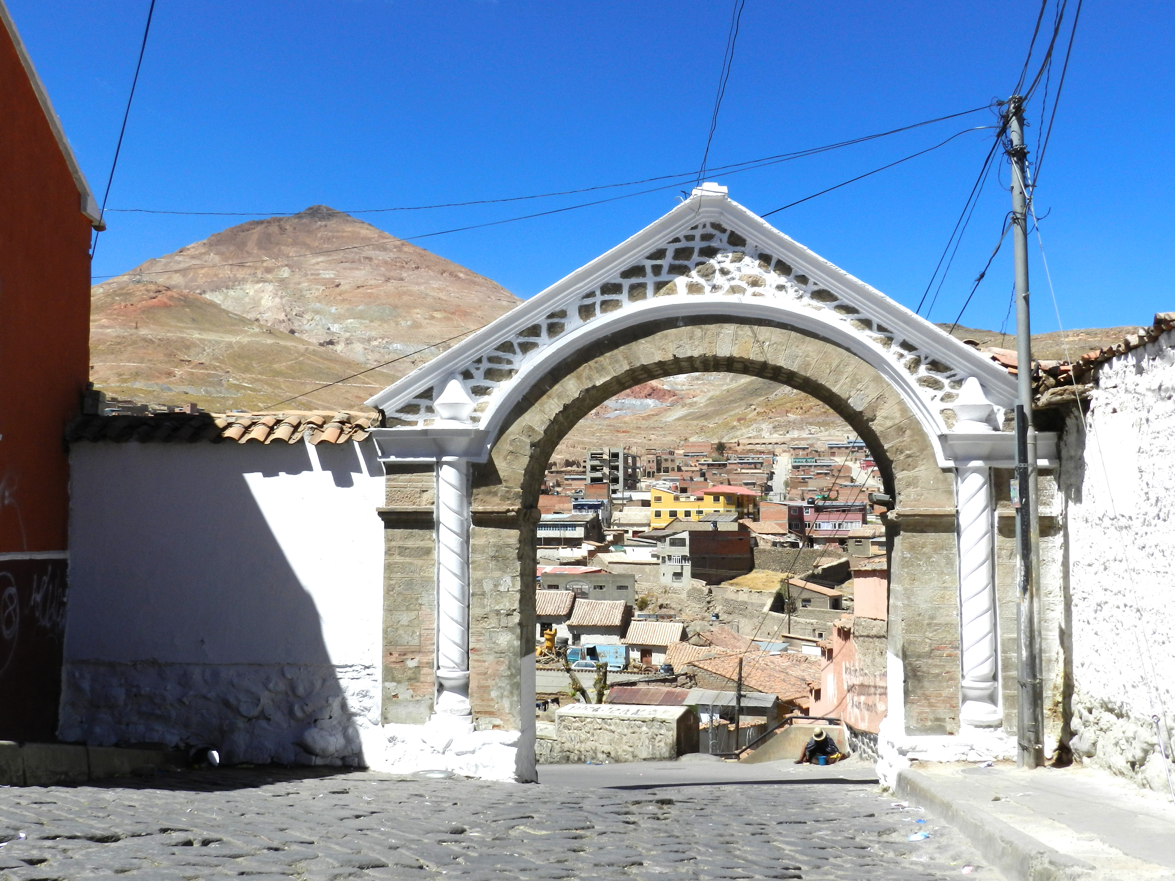 Arco de Cobija This medium shows the protected monument with the number P/00-005 in Bolivia.